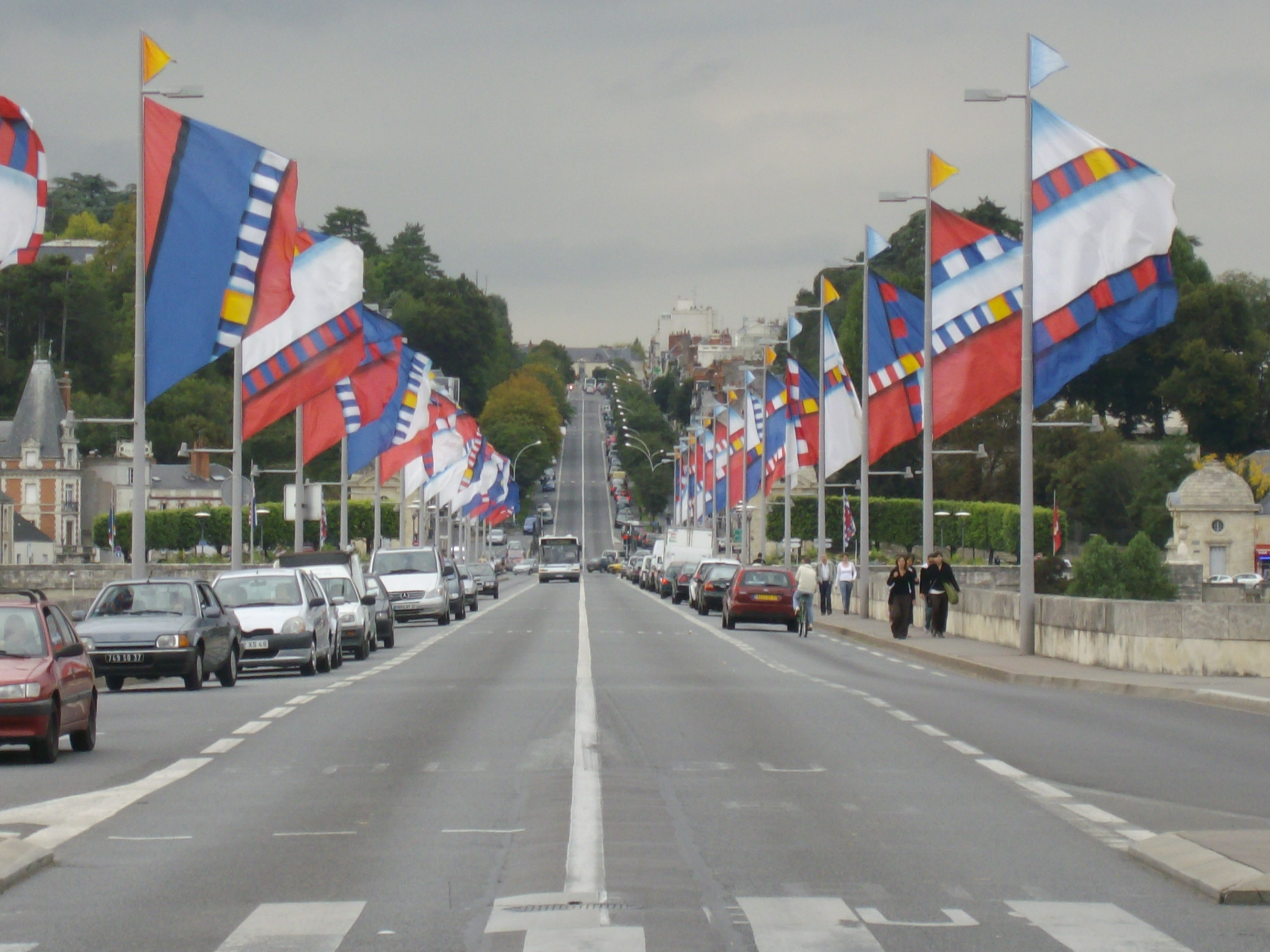 Pont Wilson et Avenue de la Tranchée à Tours (Indre-et-Loire, France) avant le tramway.